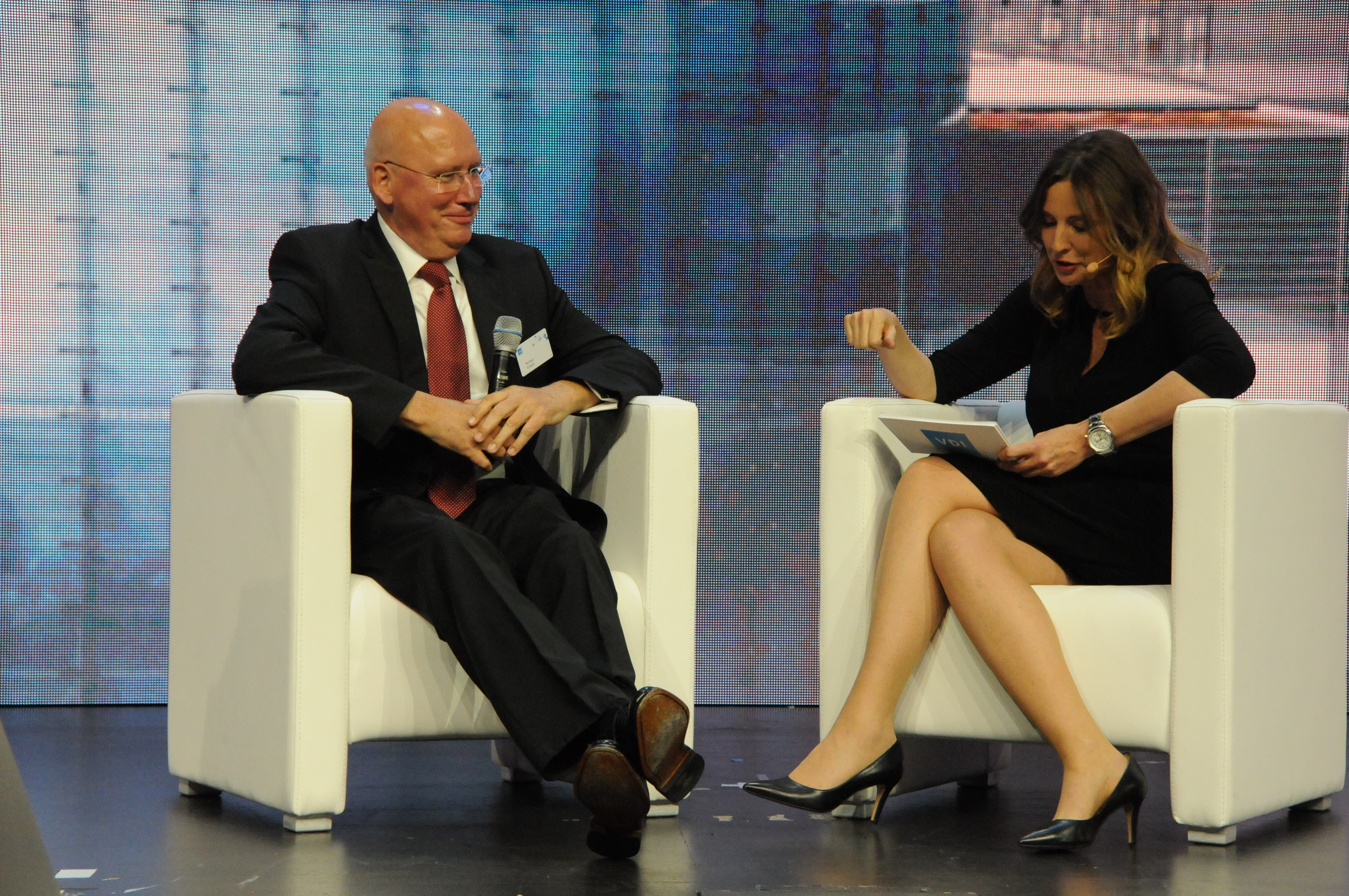 Kristina zur Mühlen auf dem Deutschen Ingenieurtag 2017 in Düsseldorf im Gespräch mit Prof. Dr. Michael Schenk. Dieser ist kurz zuvor mit der Grashof-Denkmünze – der höchsten Auszeichnung durch den VDI – geehrt worden. Frau zur Mühlen moderierte die Veranstaltung.